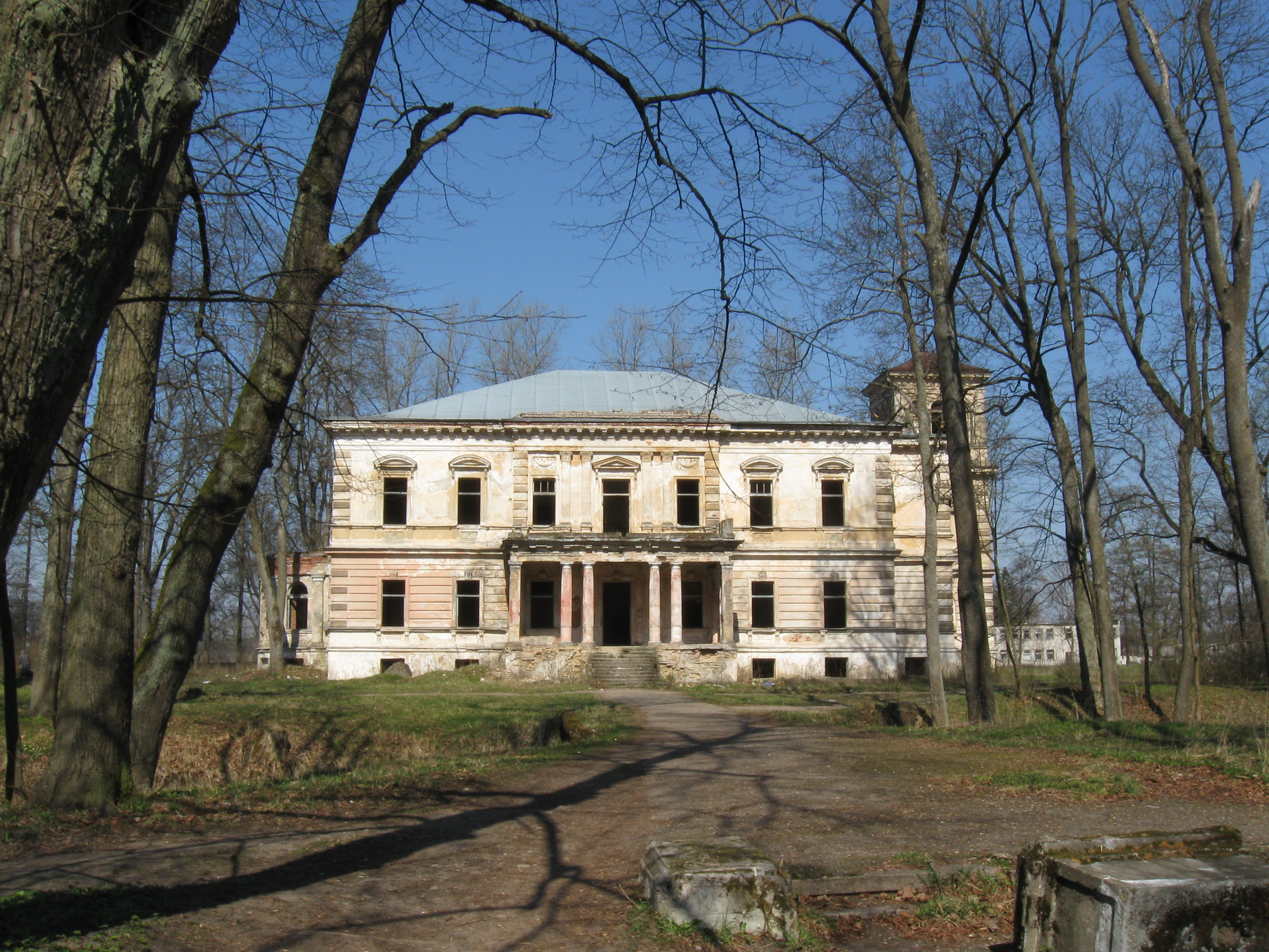 Беларуская (тарашкевіца): Сядзібна-паркавы комплекс: сядзібны дом, флігель, лядоўня, службовы будынак, будынак музычнай школы, вяндлярня, парк, паркавы павільён, водная сыстэма (сажалкі, каналы, мосьцікі). мяст. Лынтупы This is a photo of Belarusian heritage monument. Reference number: 213Г000874 ( WLM)